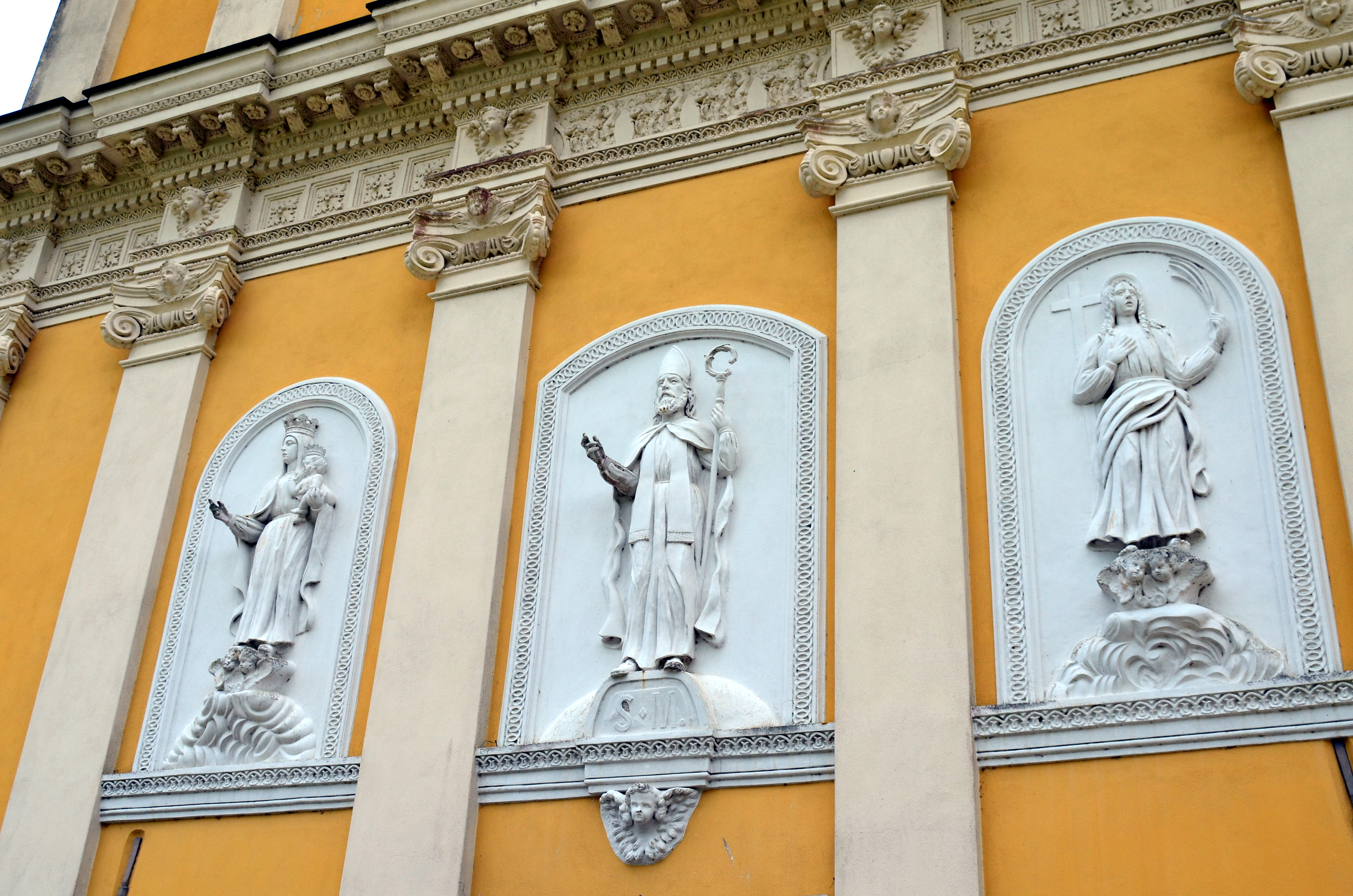 Chiesa di San Martino di Caminata, Ne, Liguria, Italia